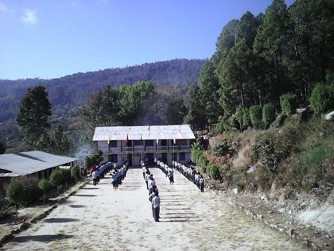 नेपाली: Sarba ma vi